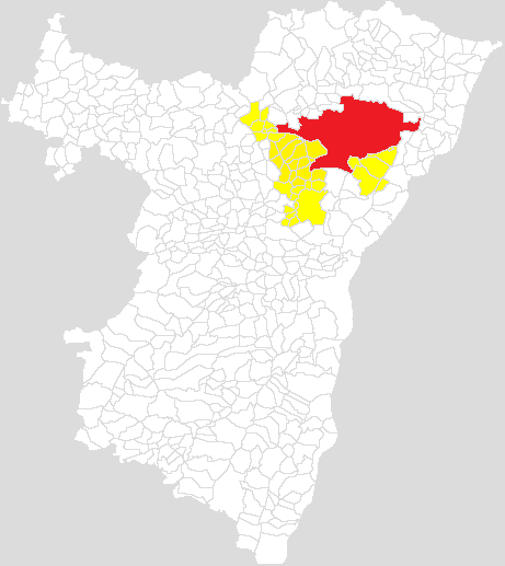 Cartographie